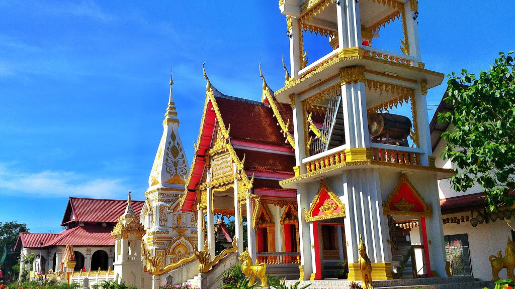 วัดประจำอำเภอนาหว้า